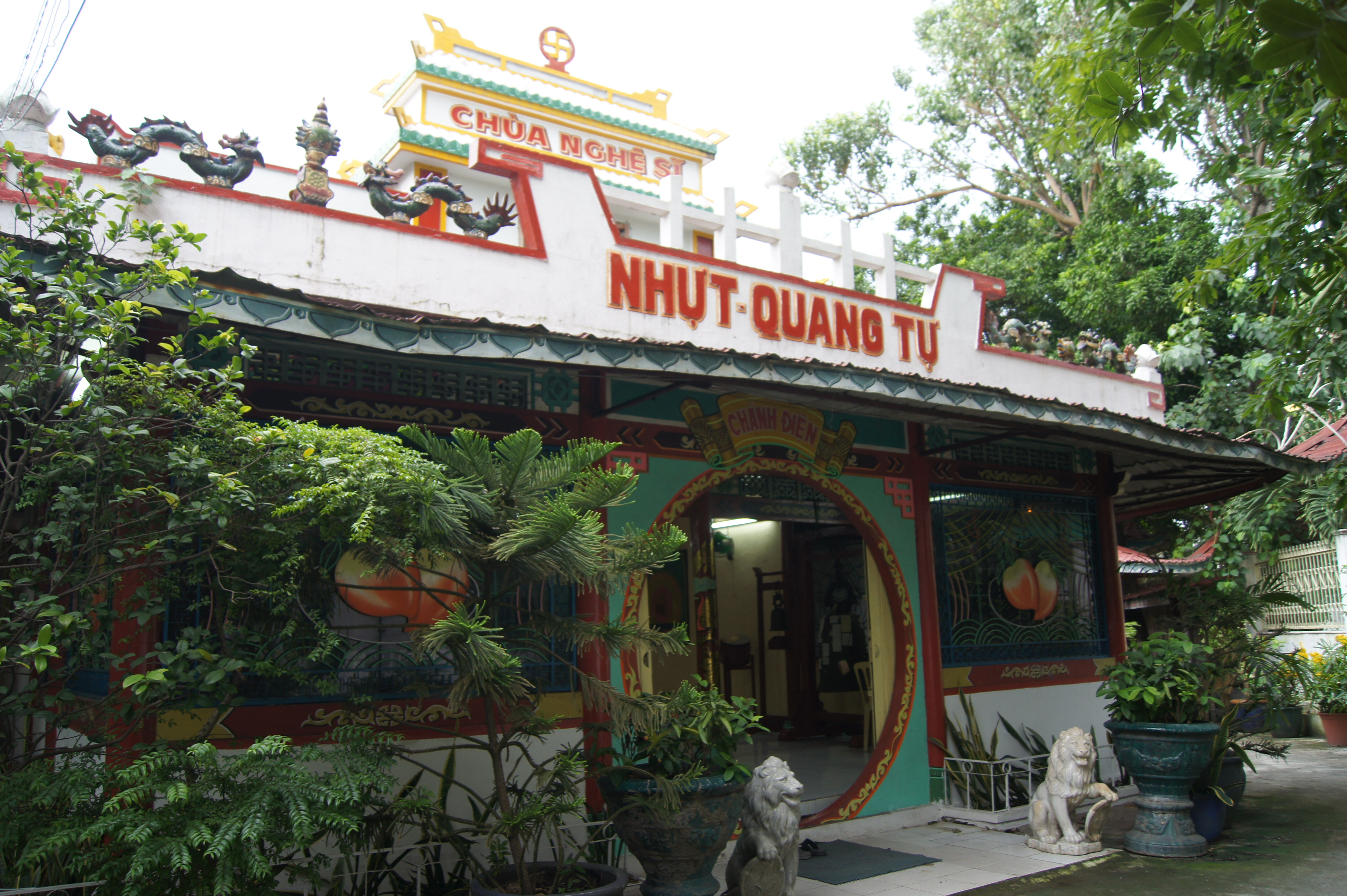 Chùa Nghệ Sĩ ở Tp. Hồ Chí Minh.